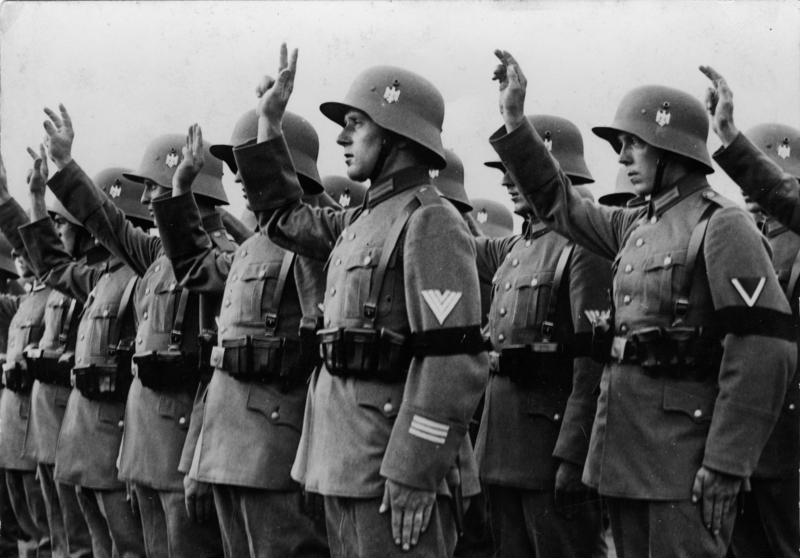 Die feierliche Vereidigung der Reichswehr auf den neuen Reichspräsidenten Adolf Hitler! Die Mannschaften mit Trauerflor beim Ablegen des Eides auf den neuen Reichspräsidenten Adolf Hitler.